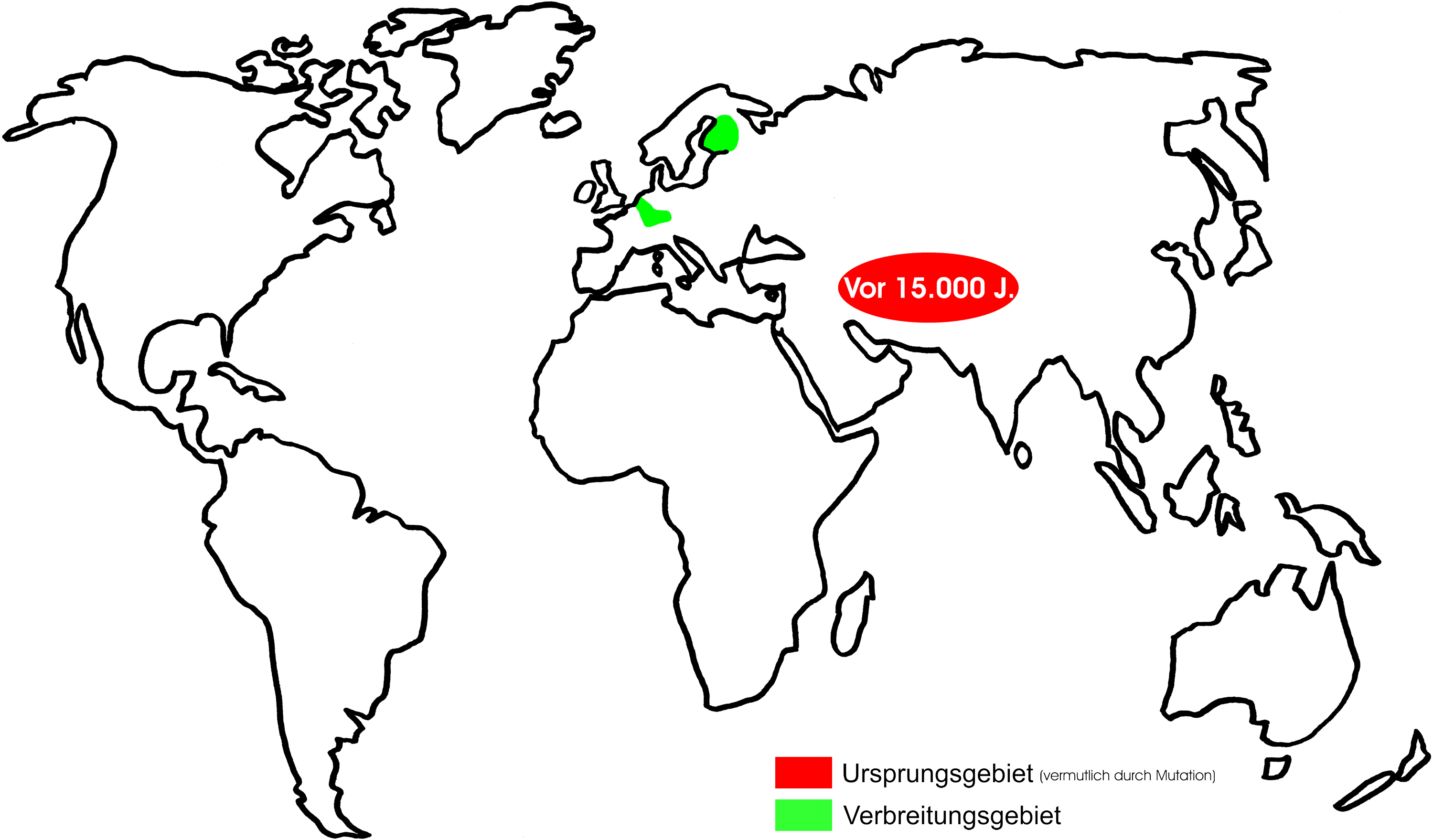 Ursprung und Verbreitung von Dinkel